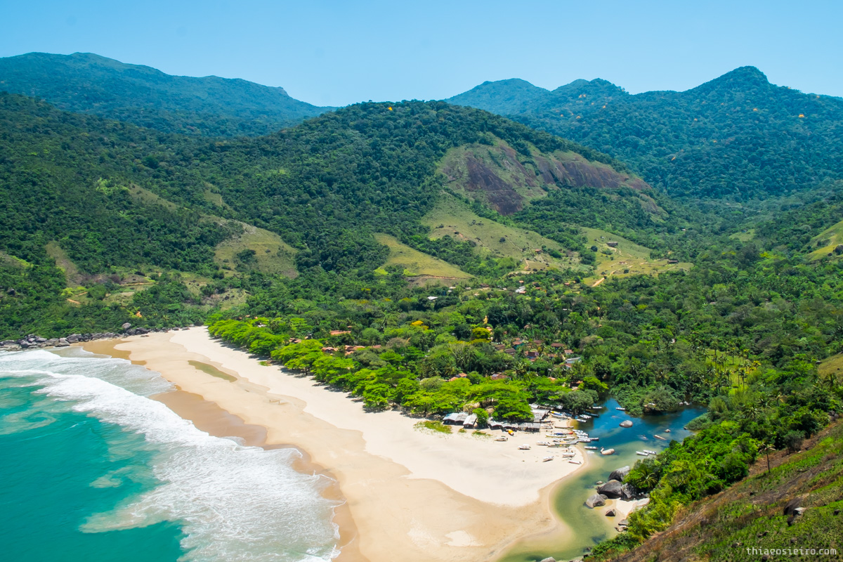 Visão aérea de umas das 10 praias mais bonitas do Brasil.